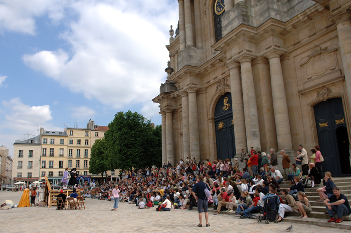 Parade sur la place devant la cathédrale Saint-Louis de Versailles au festival Le Mois Molière en juin 2009.